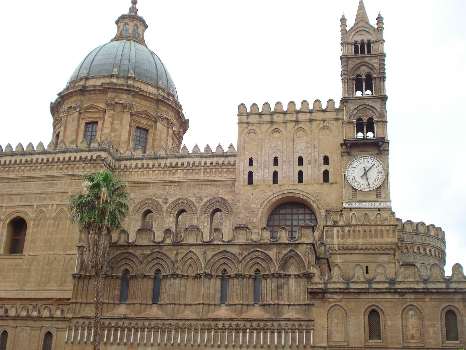 Восточная часть собора Палермо арабо-норманнского стиля